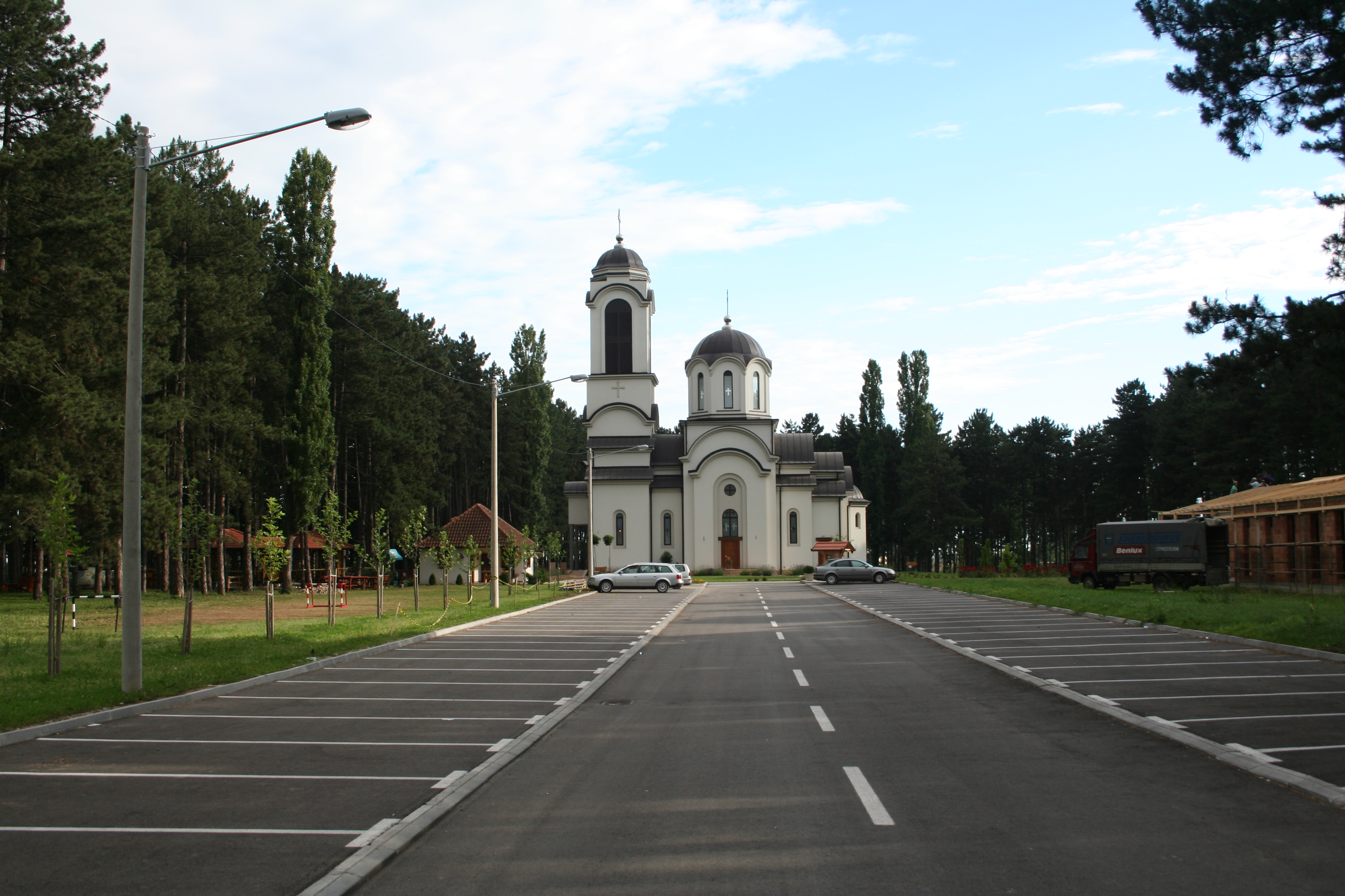 Crkva Svete Trojice na Letnjikovcu, u Šapcu